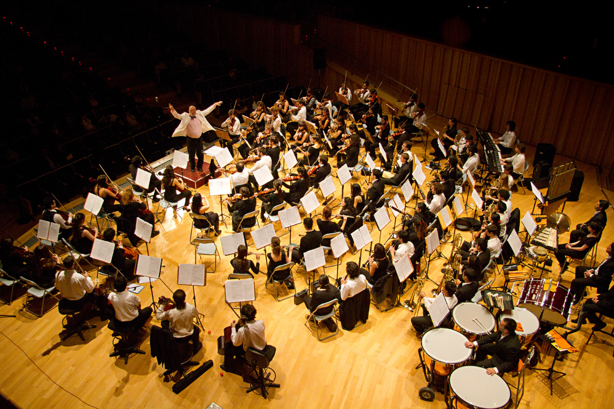 Foto: Estrella Herrera